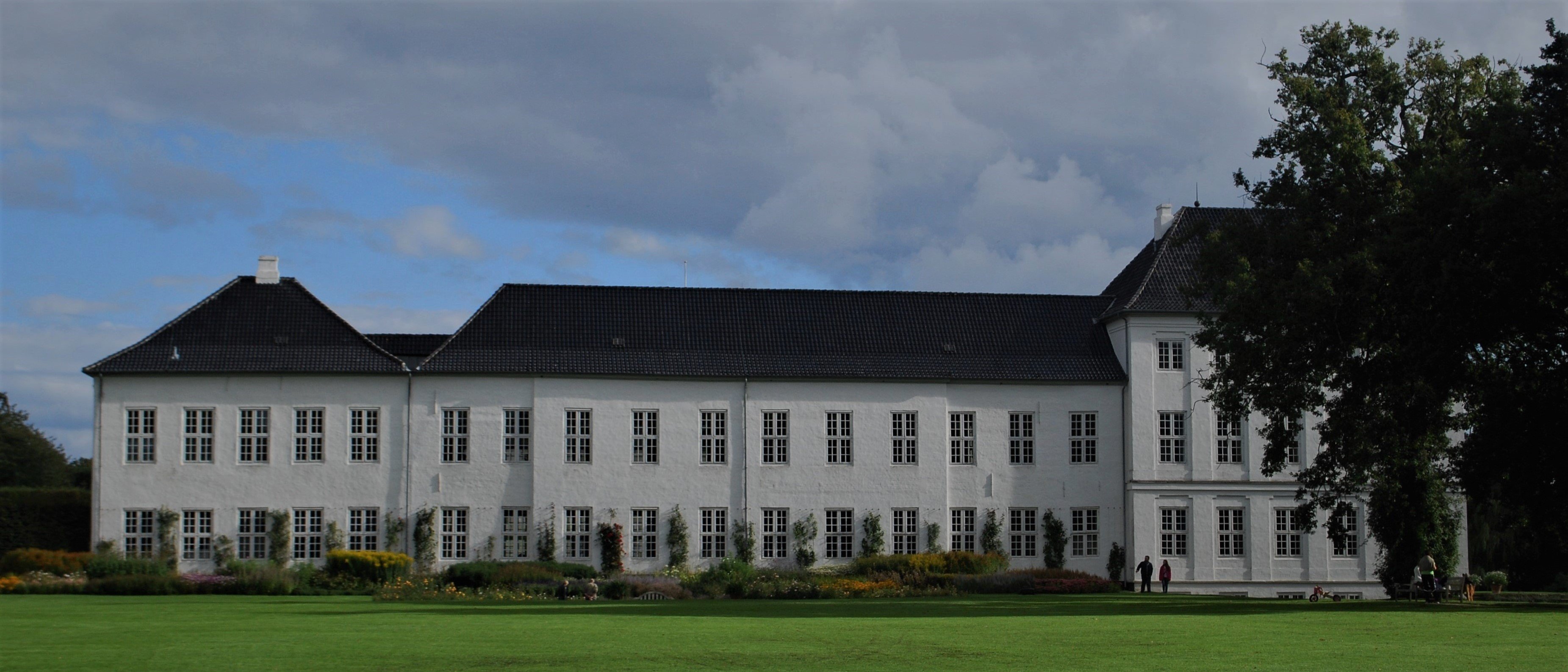 Gråsten Slotskirke, Gråsten, Danmark